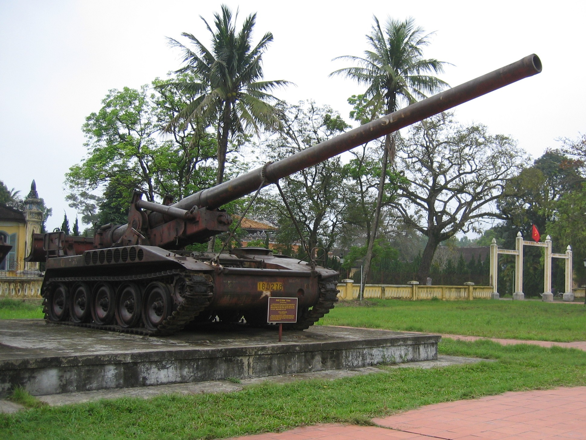 Panzer aus dem Vietnamkrieg Hue Vietnam